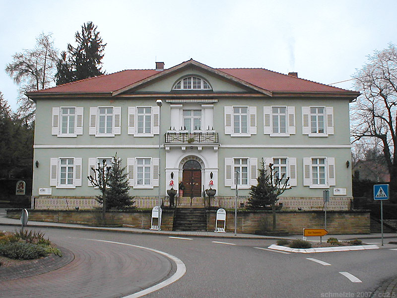 Apotheke, früheres Bezirksamtsgebäude in Neckarbischofsheim